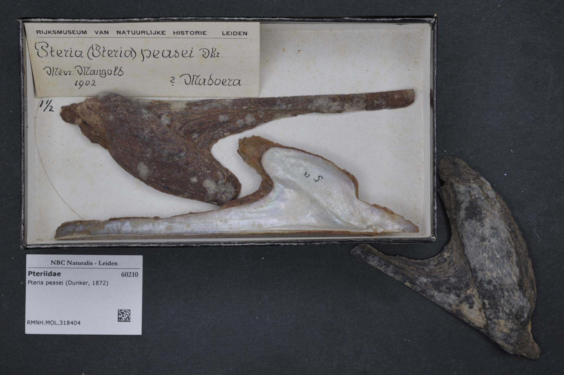 Pteria peasei (Dunker, 1872)